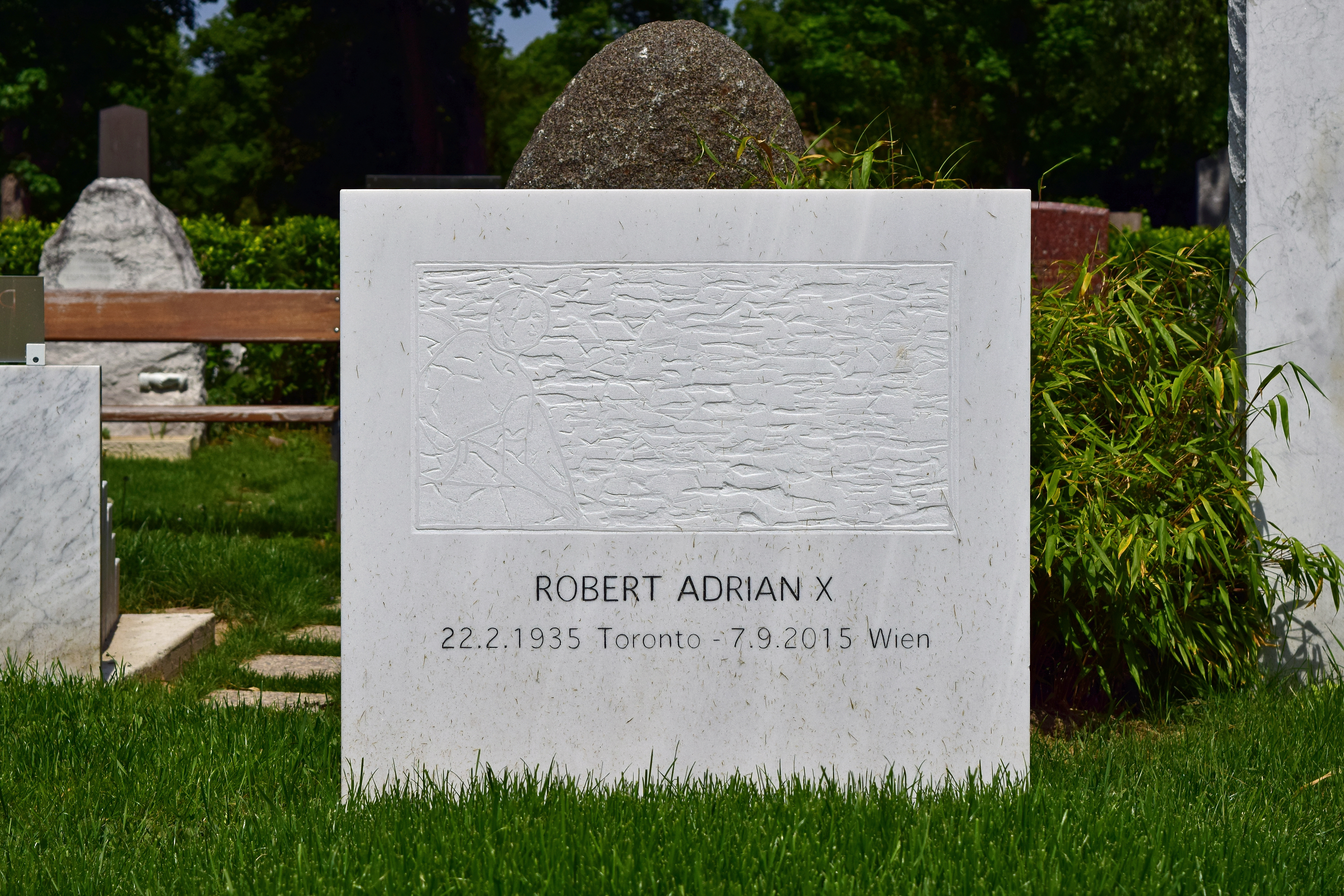 Ehrenhalber gewidmetes Grab von Robert Adrian X auf dem Wiener Zentralfriedhof, Gruppe 40. (Bezüglich des Namens siehe: [1]; weitere Infos: [2] und [3])